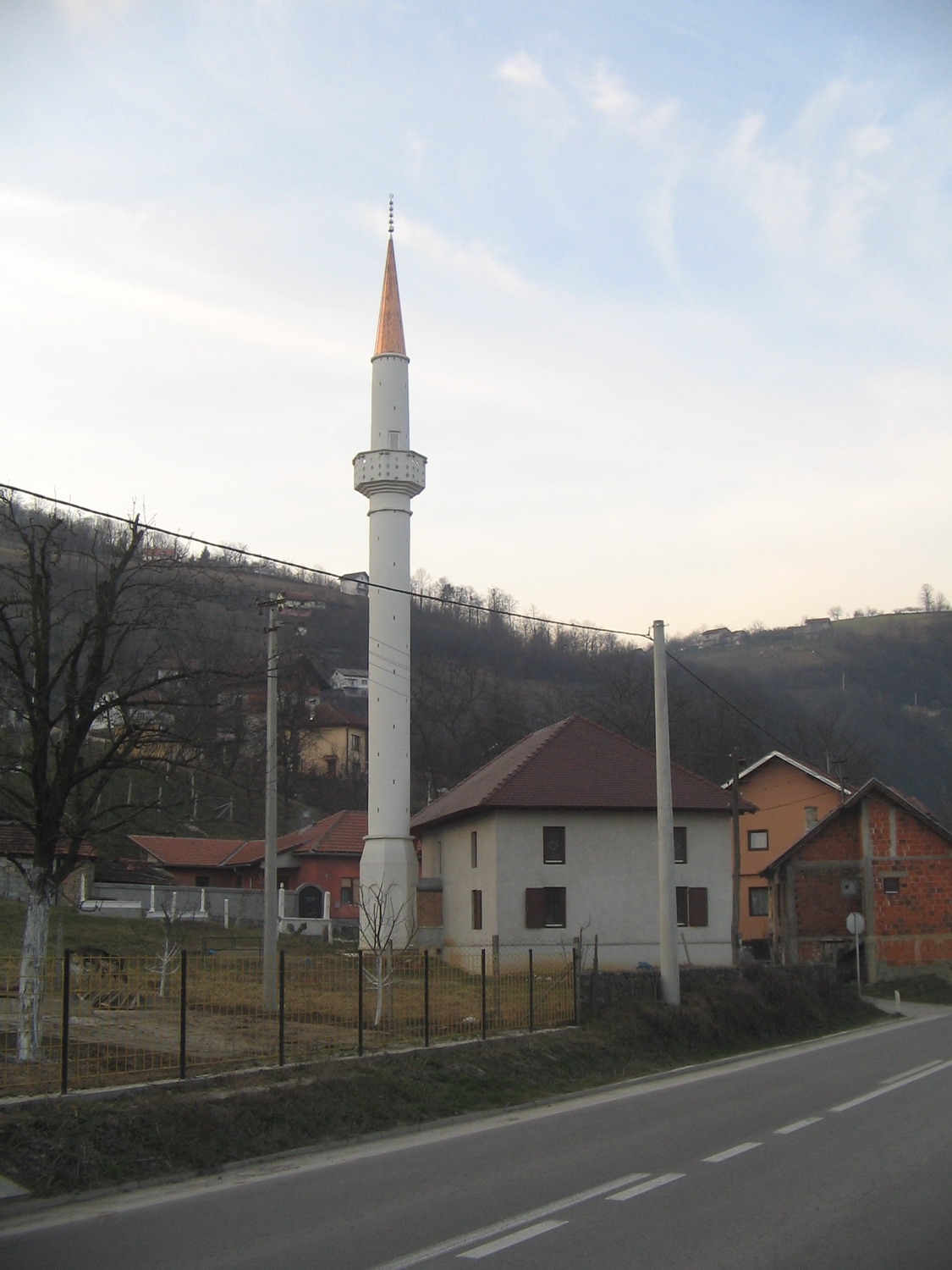 Хаџи Куртова џамија у Новоселији (Бања Лука)